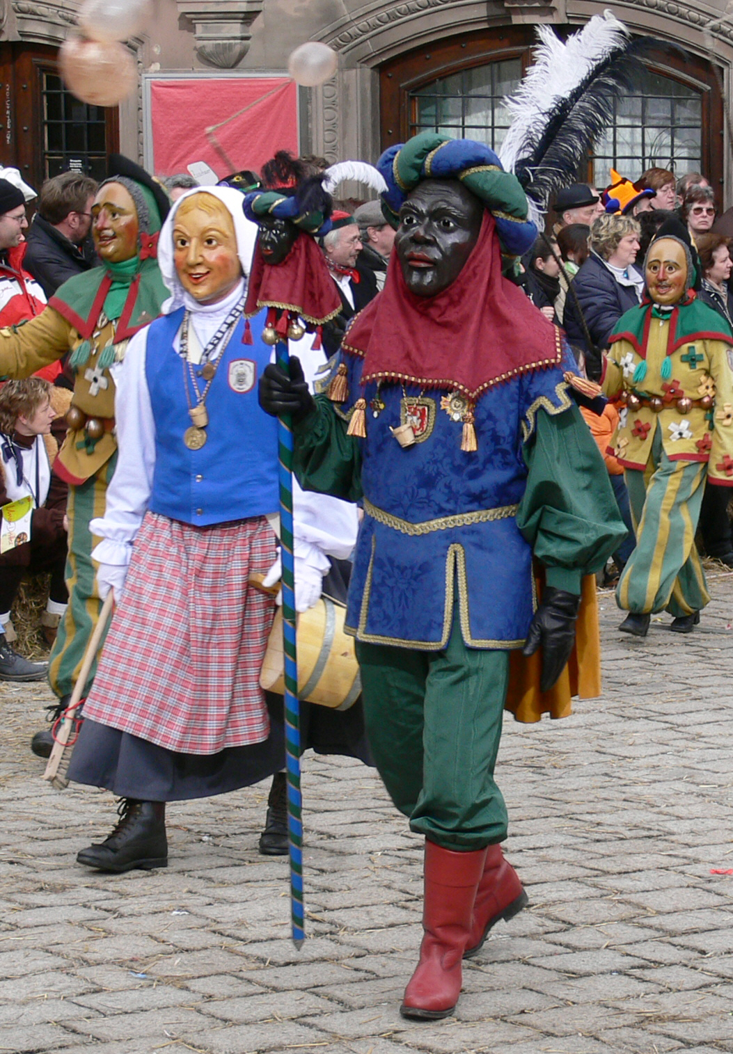 Narrenzunft Gole 1865 e. V. Riedlingen, Figur: Laufmohr und Waschweib aus der Häsgruppe Laufmohr und Waschweiber Veranstaltung: Narrensprung beim Narrentreffen Meßkirch 2006